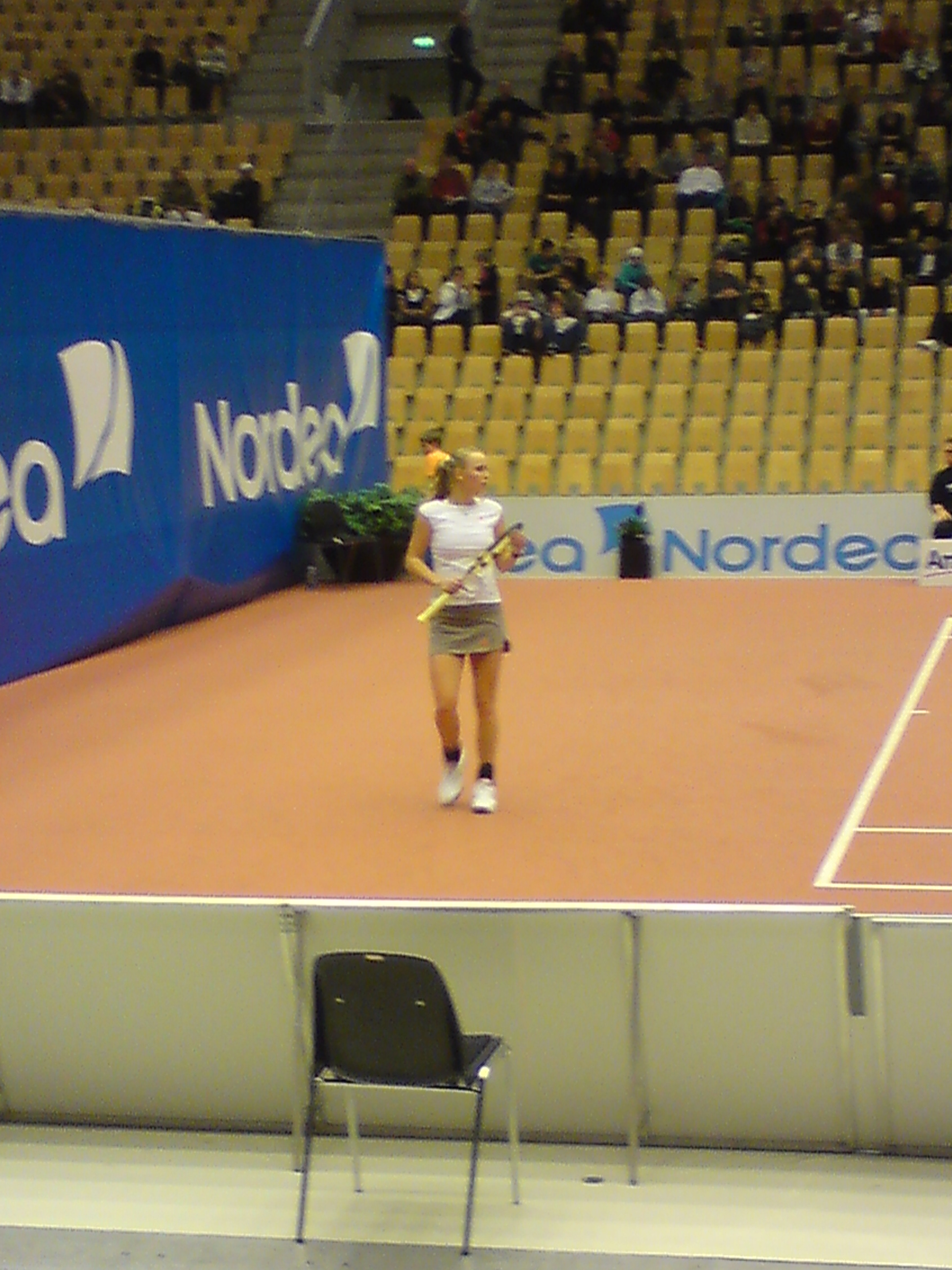 Caroline Wozniacki under Nordea Danish Open 2008 i Arena Fyn, Odense